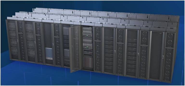 Centro de Supercomputación de Castilla y León